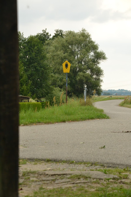 Gartz (Oder) - Schwedt (Oder)